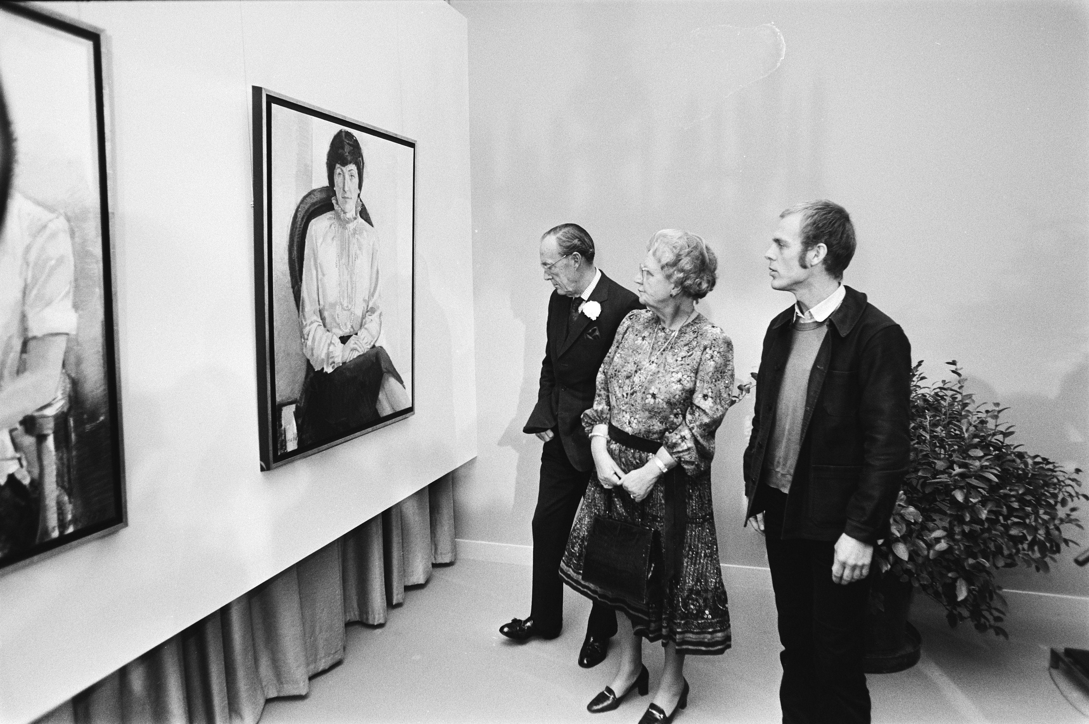 Collectie / Archief : Fotocollectie Anefo Reportage / Serie : Koningin neemt op Paleis het Loo Nationaal Geschenk in ontvangst ter gelegenhied van haar 70e verjaardag Beschrijving : Prins Bernhard (l), koningin Juliana en schilder Dick Stapel bij het portret van prinses Margriet Datum : 23 november 1979 Locatie : Apeldoorn/Gelderland Trefwoorden : koninginnen, paleizen, portretschilders, portretten, prinsen Persoonsnaam : Bernhard (prins Nederland), Juliana (koningin Nederland), Stapel, Dick Instellingsnaam : Paleis Het Loo Fotograaf : Croes, Rob C. / Anefo, [onbekend] Auteursrechthebbende : Nationaal Archief Materiaalsoort : Negatief (zwart/wit) Nummer archiefinventaris : bekijk toegang 2.24.01.05 Bestanddeelnummer : 930-5547